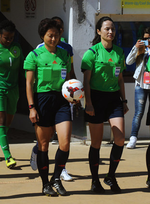 a_20_5773